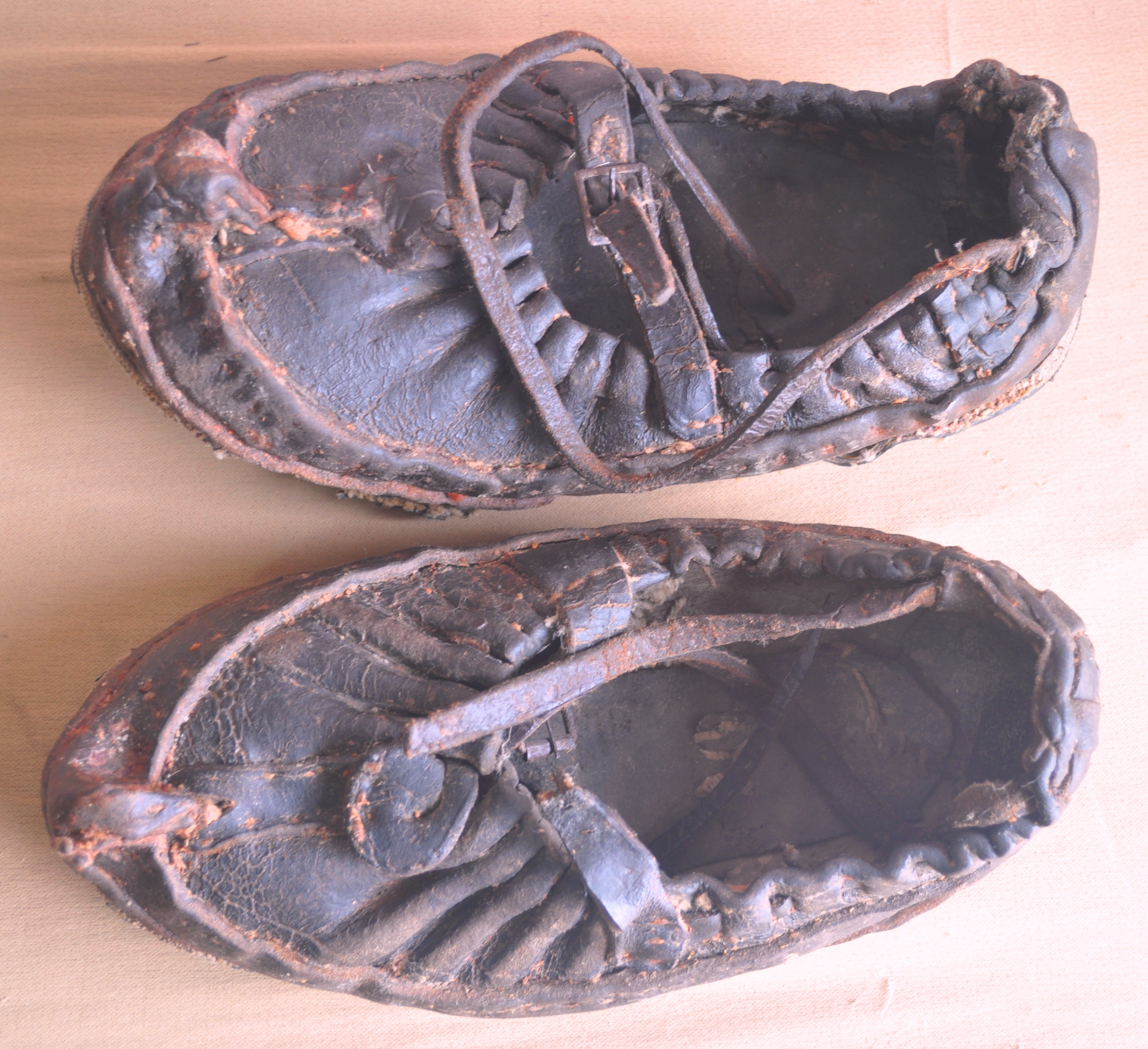 کفش چارق یکی از قدیمی ترین کفش های مردم ساکن در روستای زالی است که از چرم گاو ساخته می شد. خراسان شمالی، اسفراین ، بخش بام ، روستای زالی